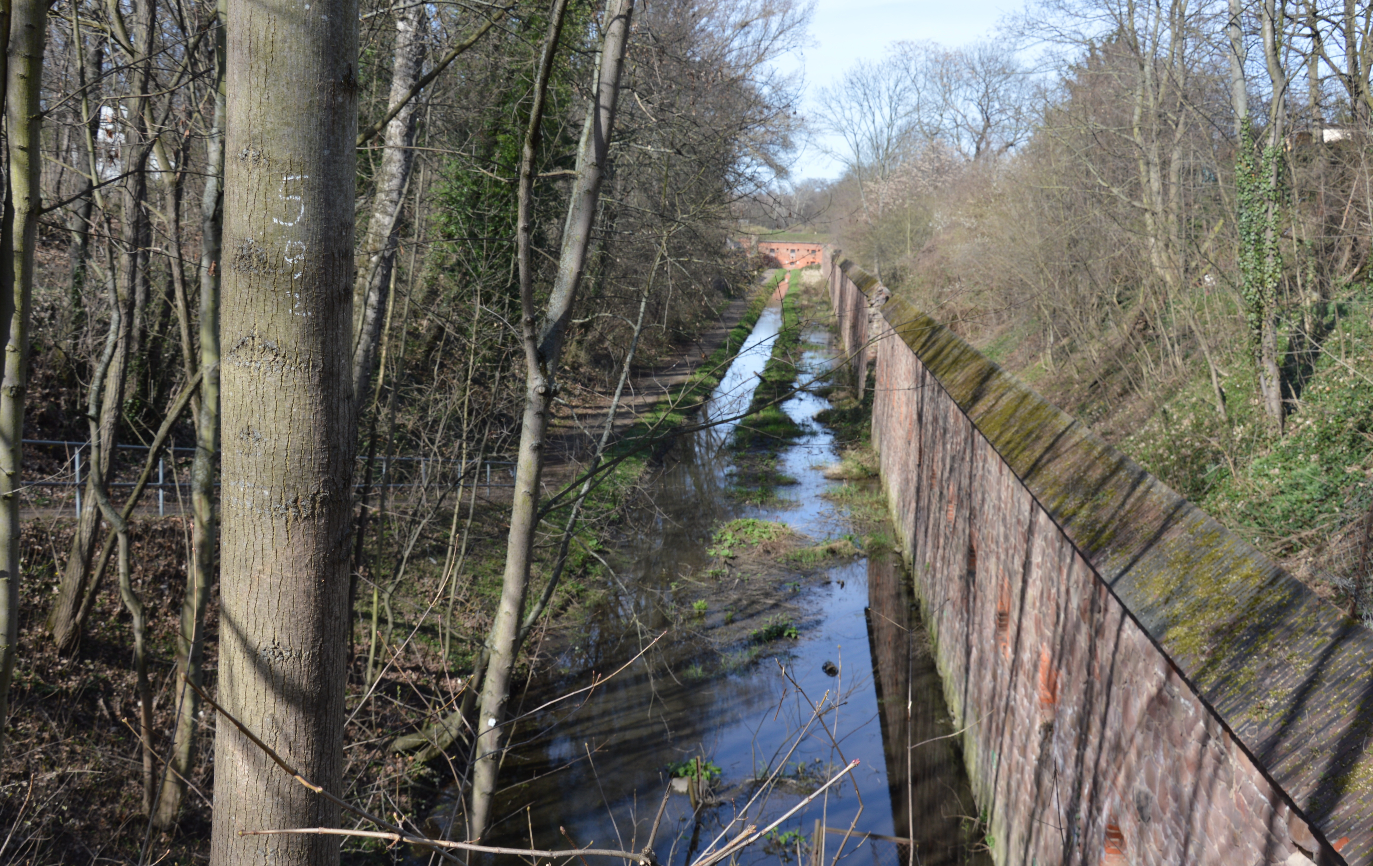 Festungsanlage Maybachstraße